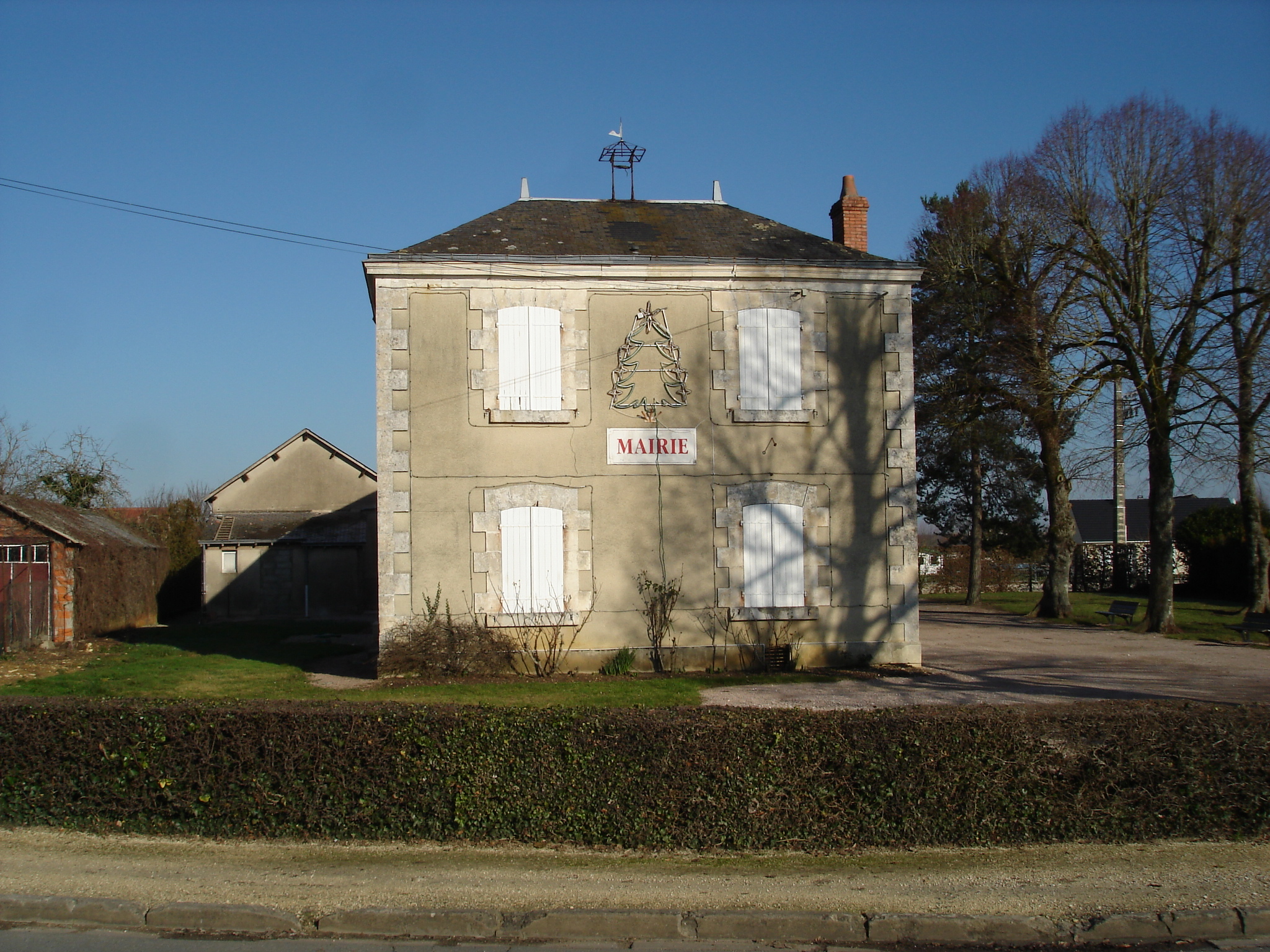 Mâron (36) : La mairie.